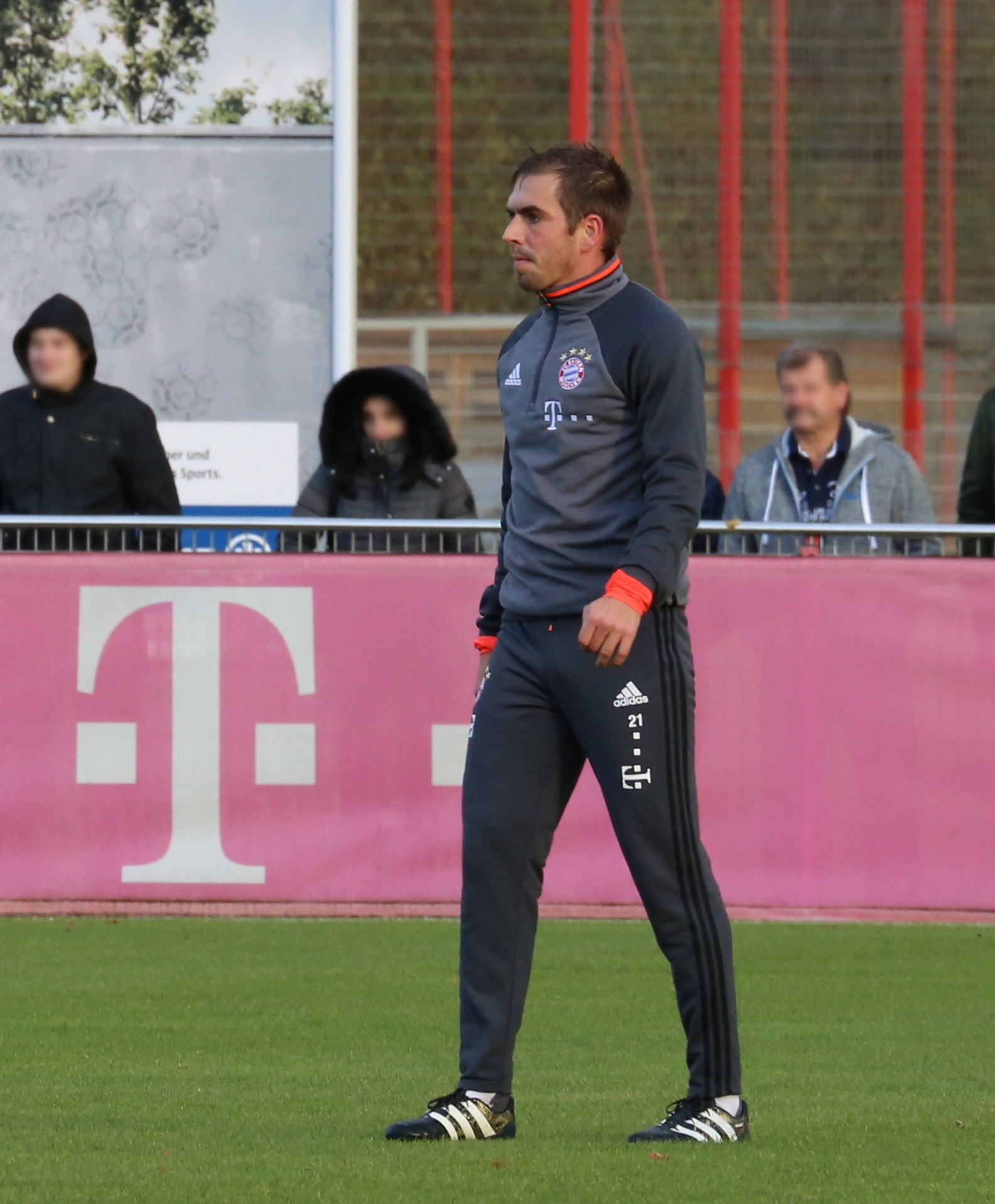 Philipp Lahm beim Training auf dem Gelände des FC Bayern München (November 2016)